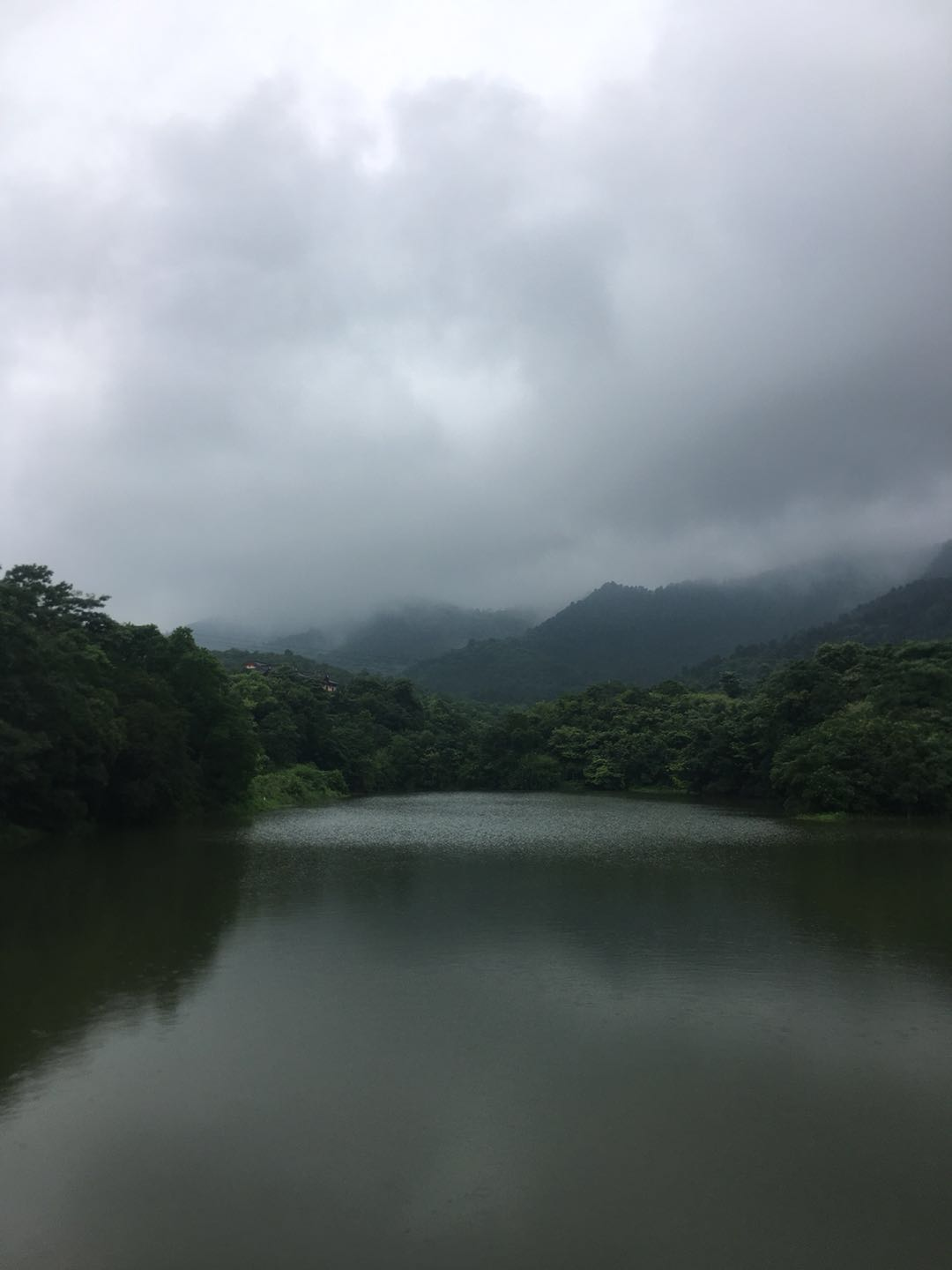 中文（中国大陆）: 敬亭山的图片1